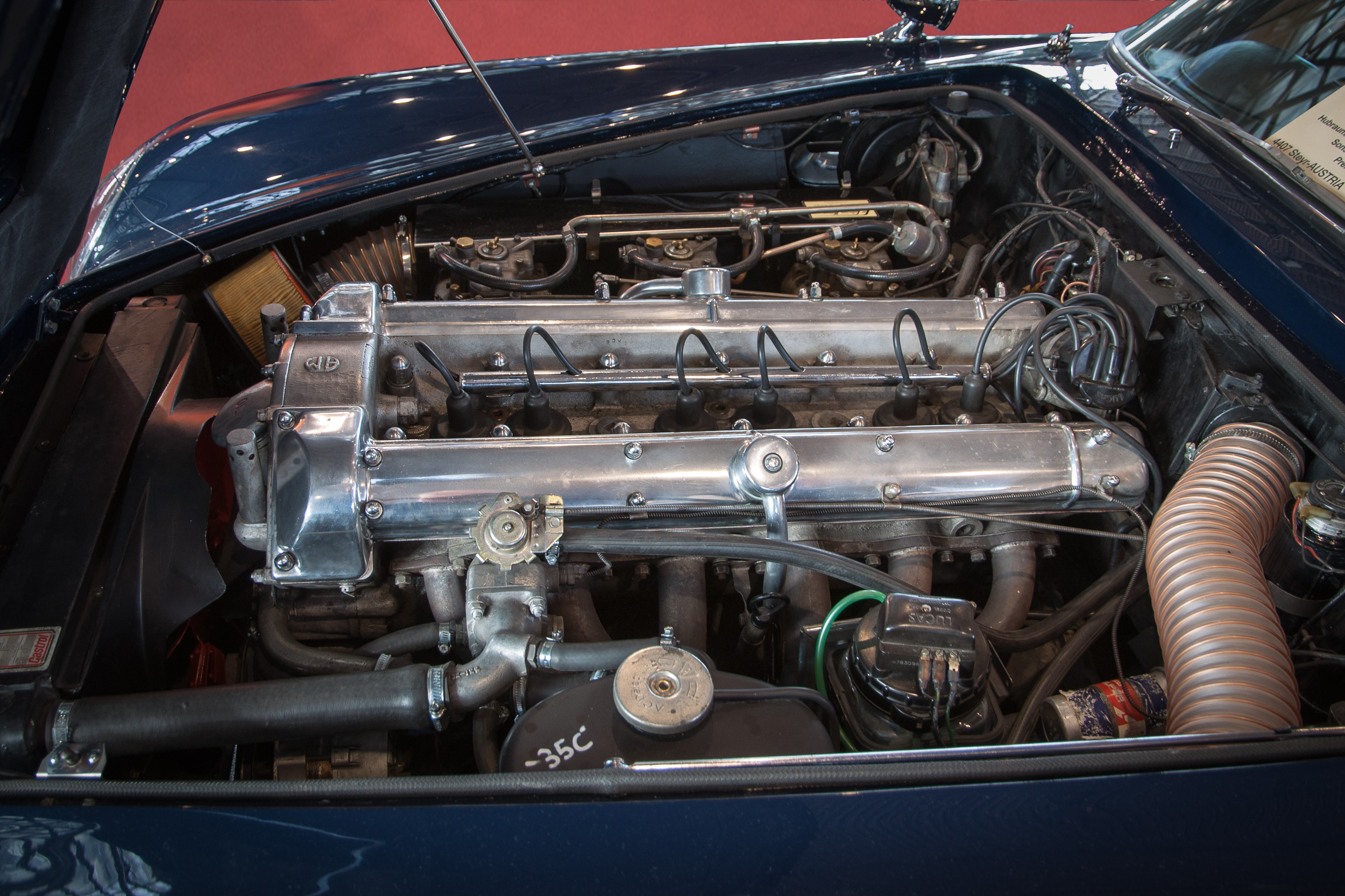 1966 Aston Martin DB6 Vantage 6-Zylinder Reihenmotor